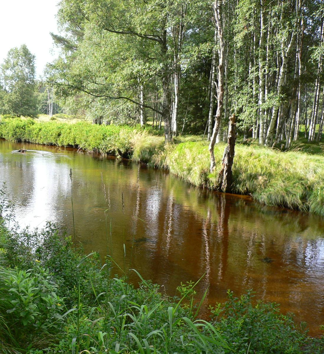 Spojená Vltava těšně před přítokem do Lipna (vodní nádrž Lipno, přehrada Lipno)